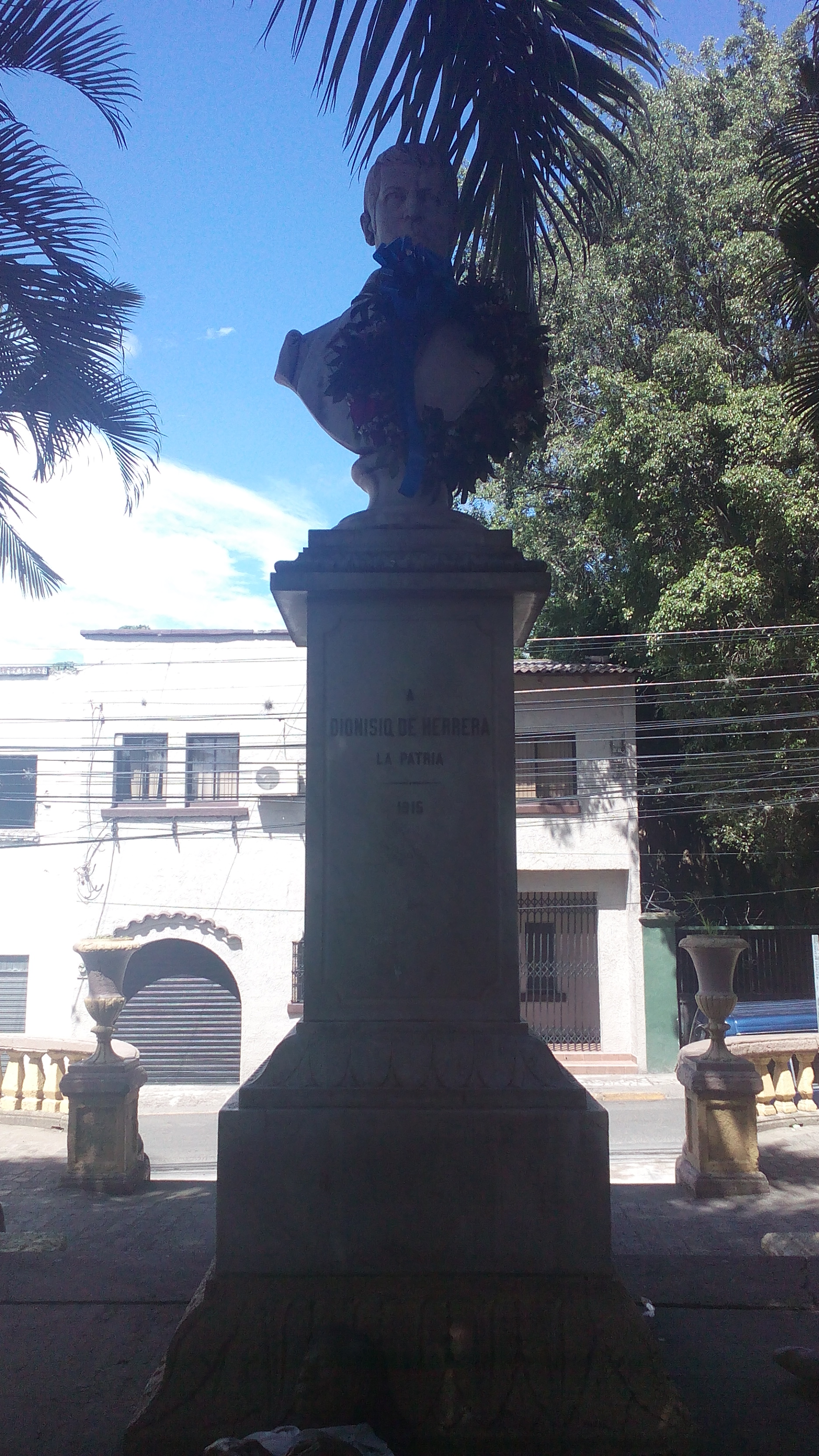 Busto de mármol del presidente hondureño Dionisio de Herrera (1781-1850), ubicado en el "Parque Herrera", Tegucigalpa, Honduras.